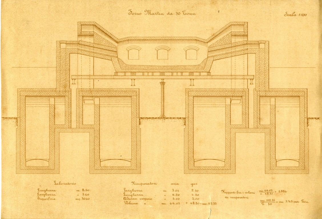 Sezione del forno Martin Siemens da 30 tonnellate (AS Terni, Archivio Società Terni, 1917)